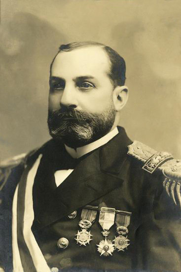 Jorge Montt Álvarez (Casablanca; 26 de abril de 1845 - † Santiago; 9 de octubre de 1922) fue Marino y político chileno y Presidente de Chile. Fue hijo de Antonio Montt y de María Álvarez, perteneció a la emblemática familia Montt. Ingresó a la Escuela Naval en 1858, enrolándose en la Marina tres años después. En la Guerra con España, tomó parte en el combate de Papudo (1865), en el que fue capturada la corbeta "Covadonga". Comandante de la "Esmeralda" en 1877, al estallar la guerra del Pacífico se incorporó a las misiones realizadas por la Armada en el norte. Participó en el combate naval de Angamos el 8 de octubre de (1879), en la toma de Pisagua (1879) y dirigió el bloqueo del Callao (1880). Hacia 1891, era capitán de navío. Conforme se fue aproximando el conflicto de 1891, los congresistas se acercaron a él. Tomó el control de la escuadra y lideró el movimiento contra José Manuel Balmaceda. Fue nombrado presidente de la Junta de Gobierno de Iquique, y tomó el mando en Santiago poco antes del suicidio de Balmaceda. Finalizada la guerra civil, hizo pública su intención de no seguir al frente del bando vencedor.